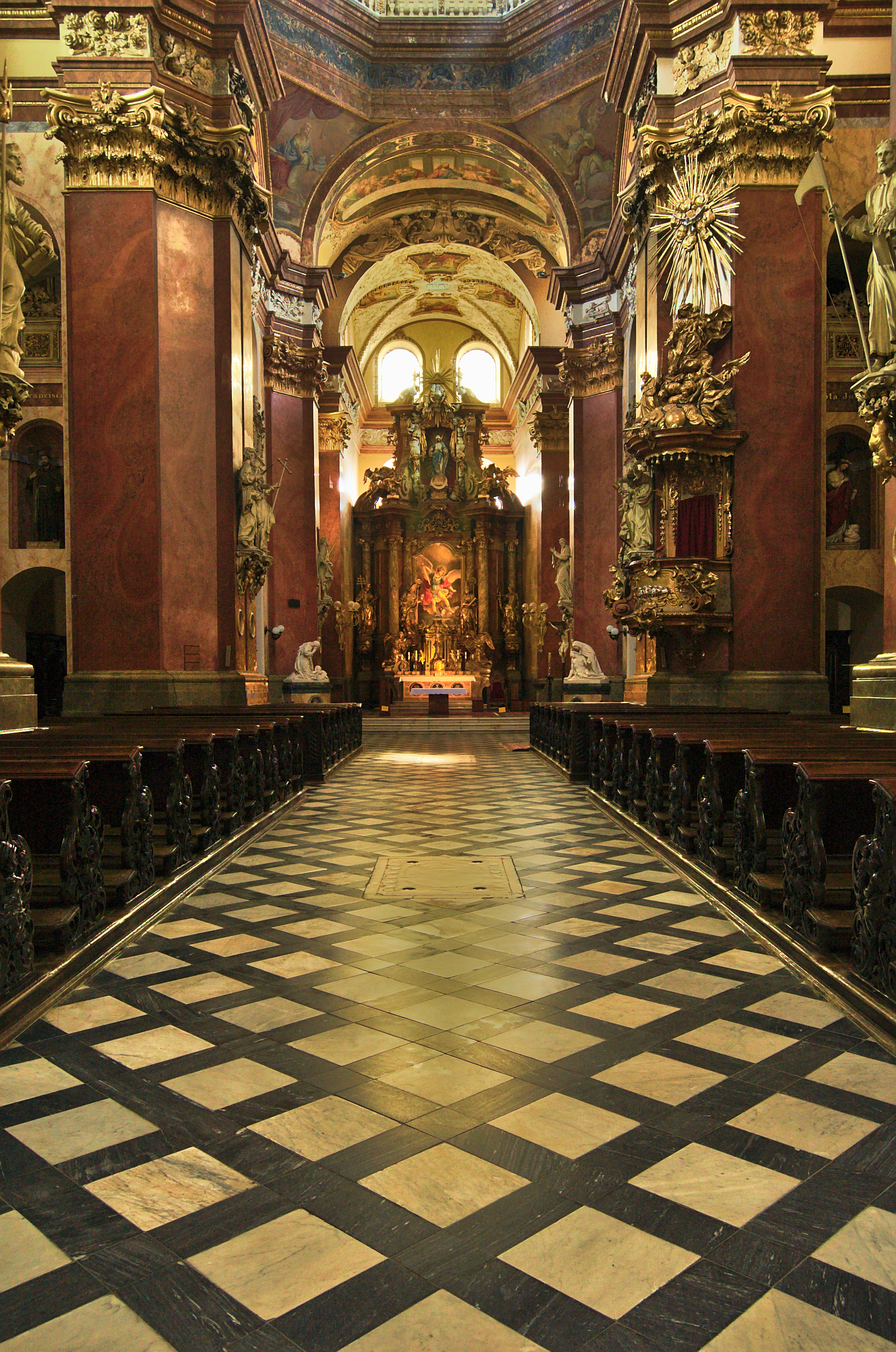 Hlavní oltář, kostel svatého Michaela archanděla, Olomouc